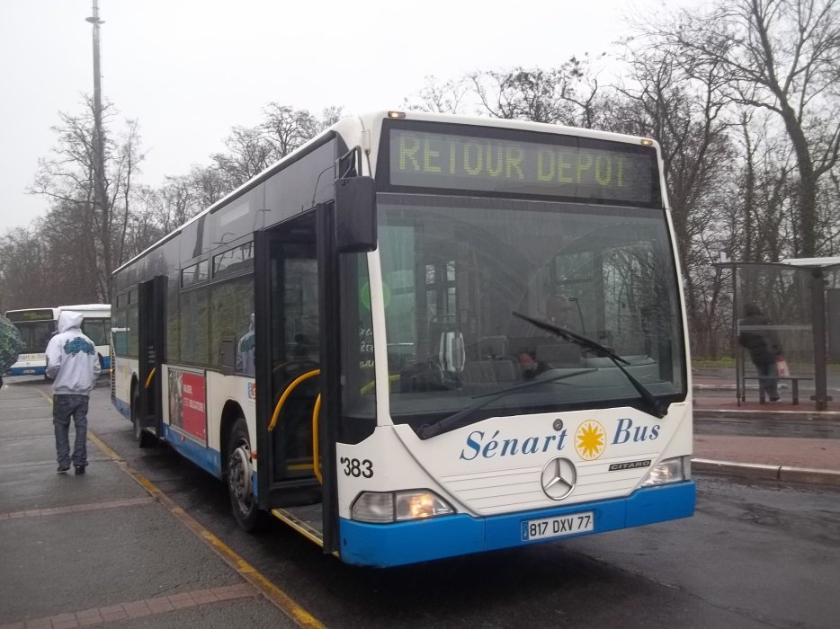 Mercedes - Benz Citaro K en attente de retour au dépot de Combs-la-Ville à la Gare de Combs-la-Ville